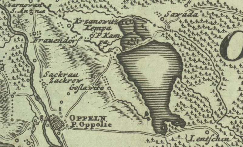 Der Große Kalichteich bei Oppeln. Ausschnitt aus einem Kupferstich von 1736.